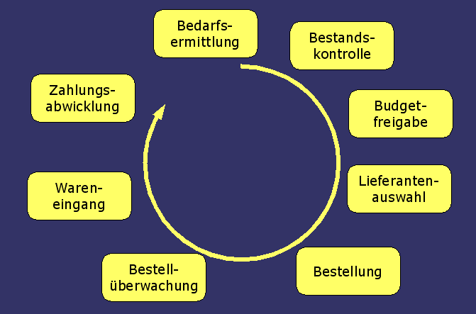 Diagramm: Operativer Beschaffungsprozess